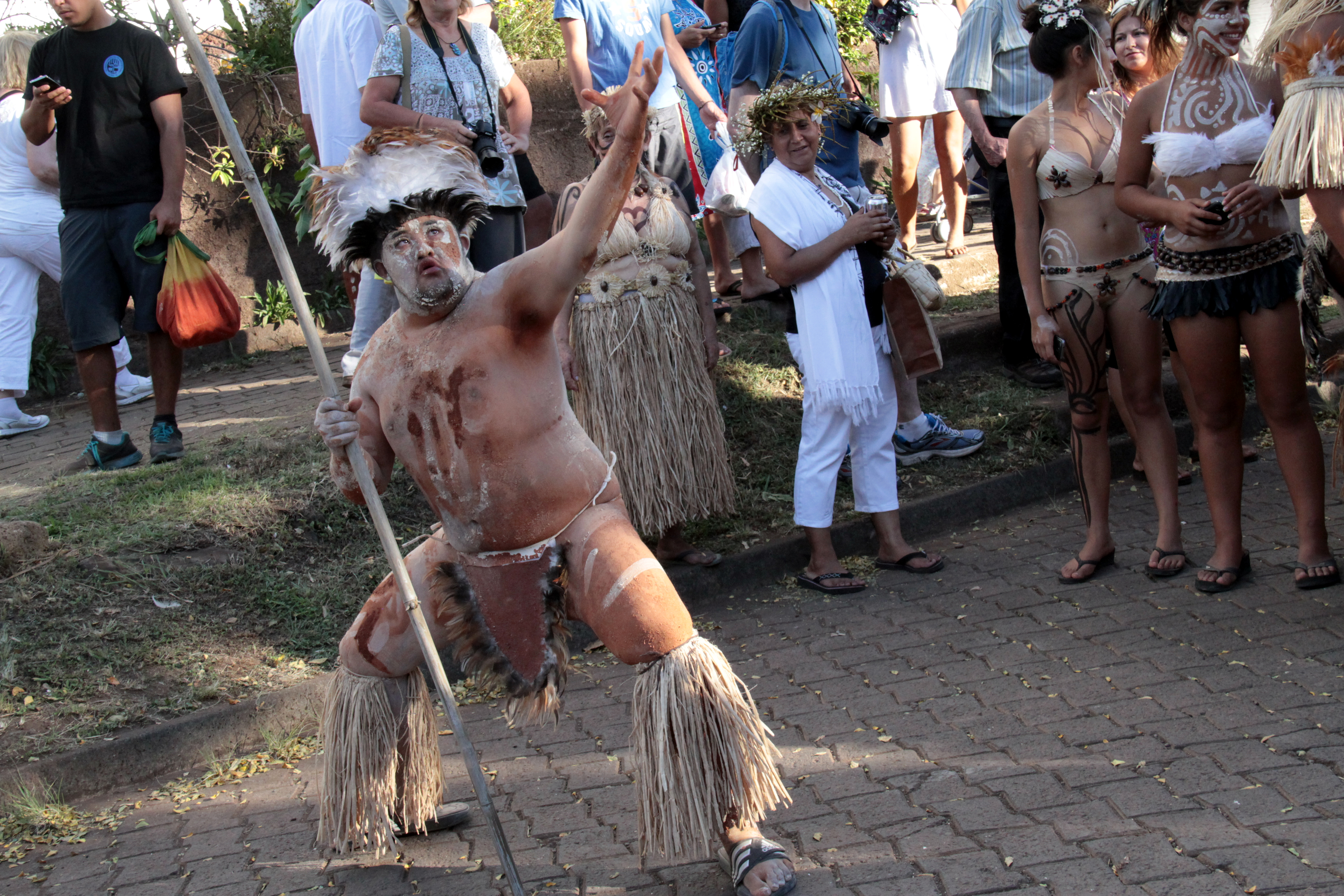 festival tapati sur l'ile de paques